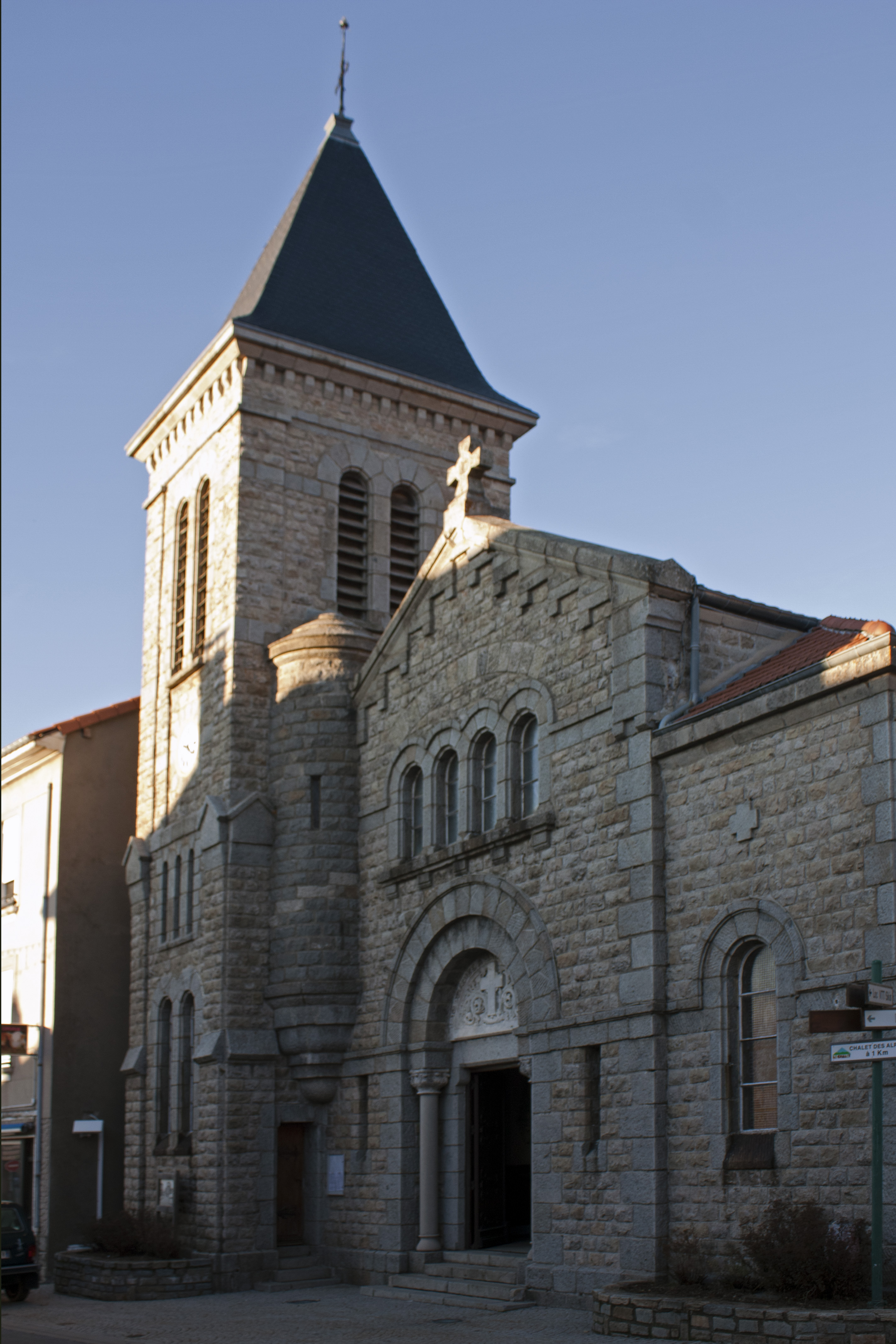 Église du Bessat